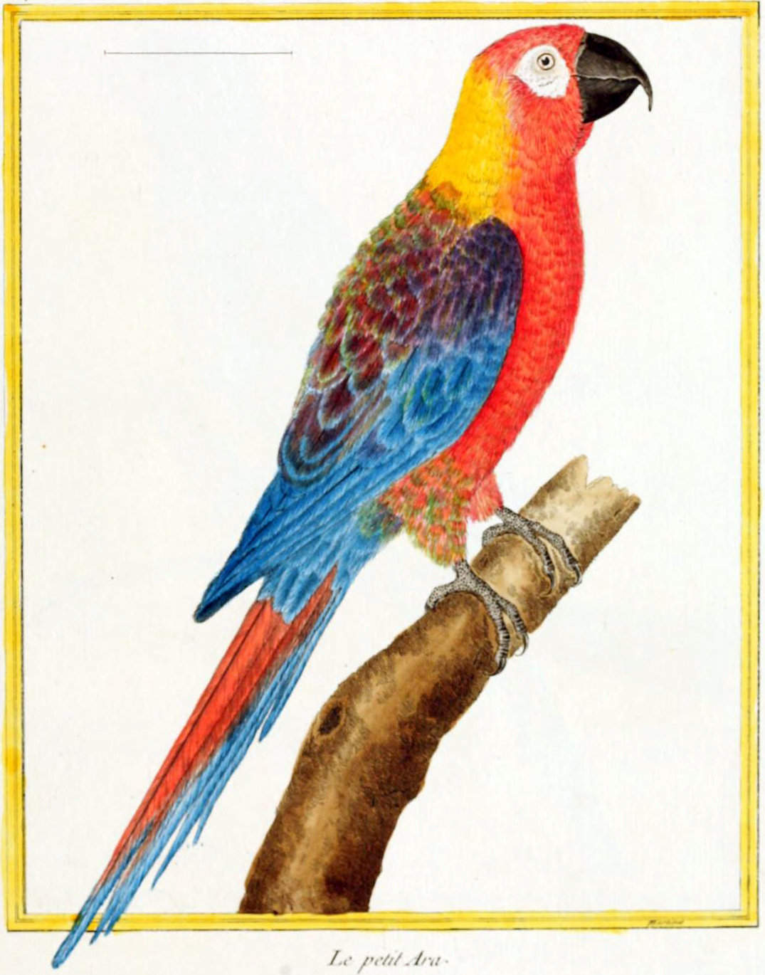 Buffon’s Planches Enluminées, pl.641.